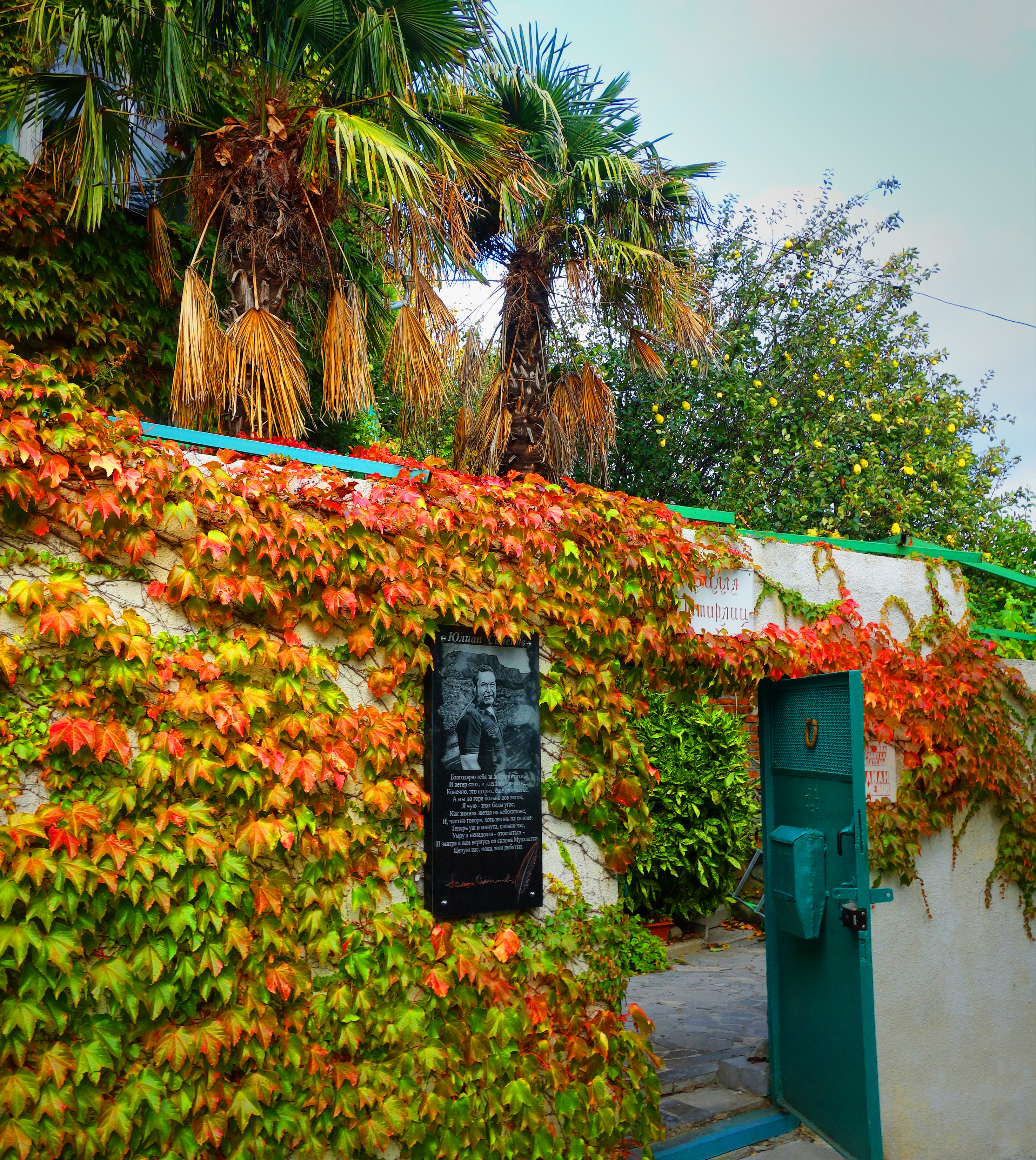 Вход в музей Юлиана Семёнова в Мухалатке в Крыму.